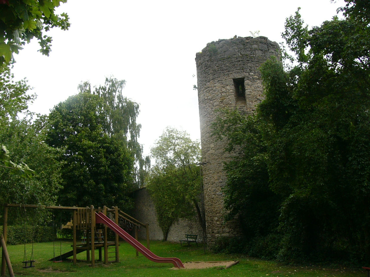 Wehrturm der Stadtmauer von Aub